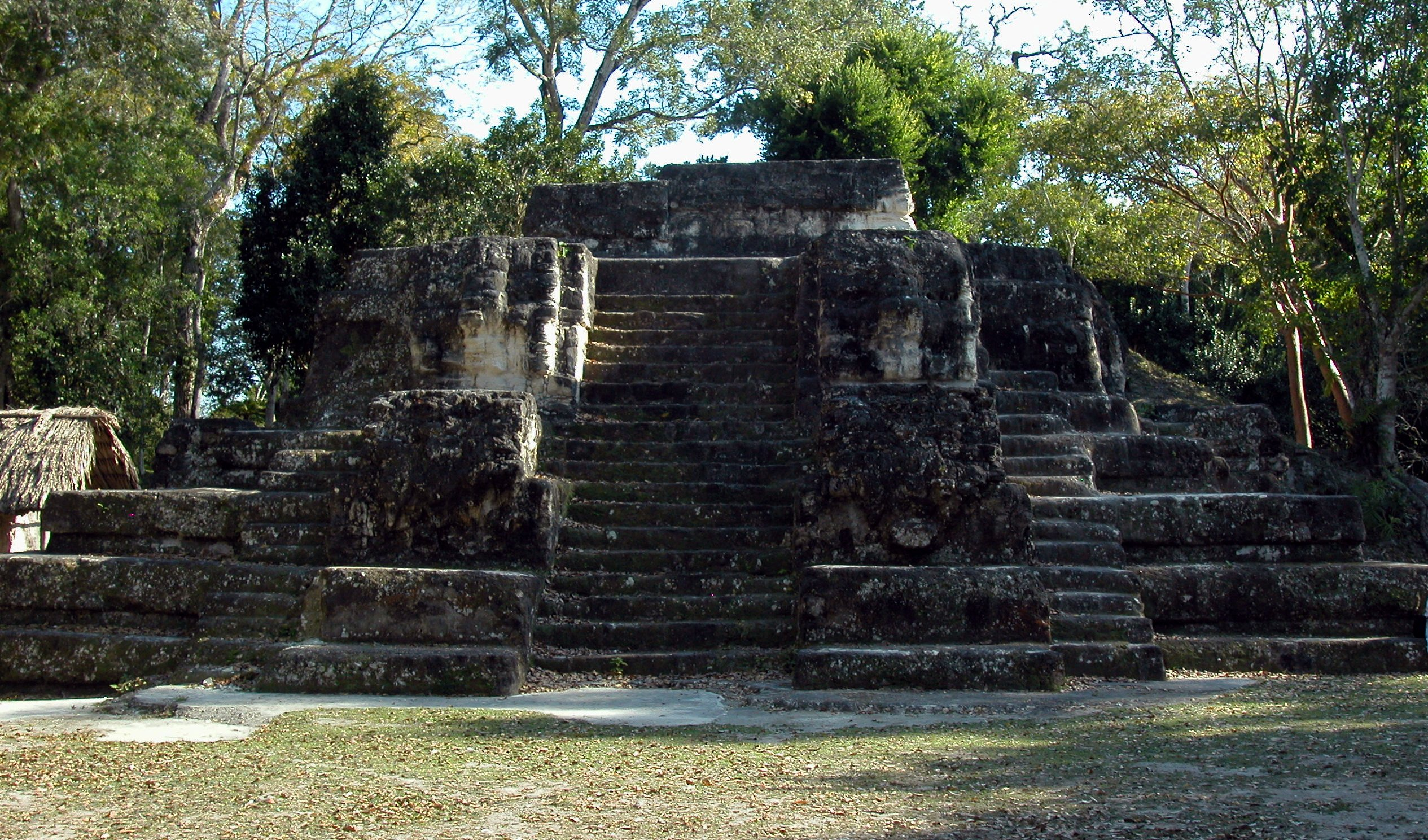 Photo de la Face Nord du temple des Masques, Batiment au centre du complexe E, Uaxactun, Guatemala. De ce temple on peut observer trois plus petits temples, à l'est, parfaitements alignés avec le lever du soleil aux equinoxes et solstices (Le soleil se lève à la même place aux 2 équinoxes).